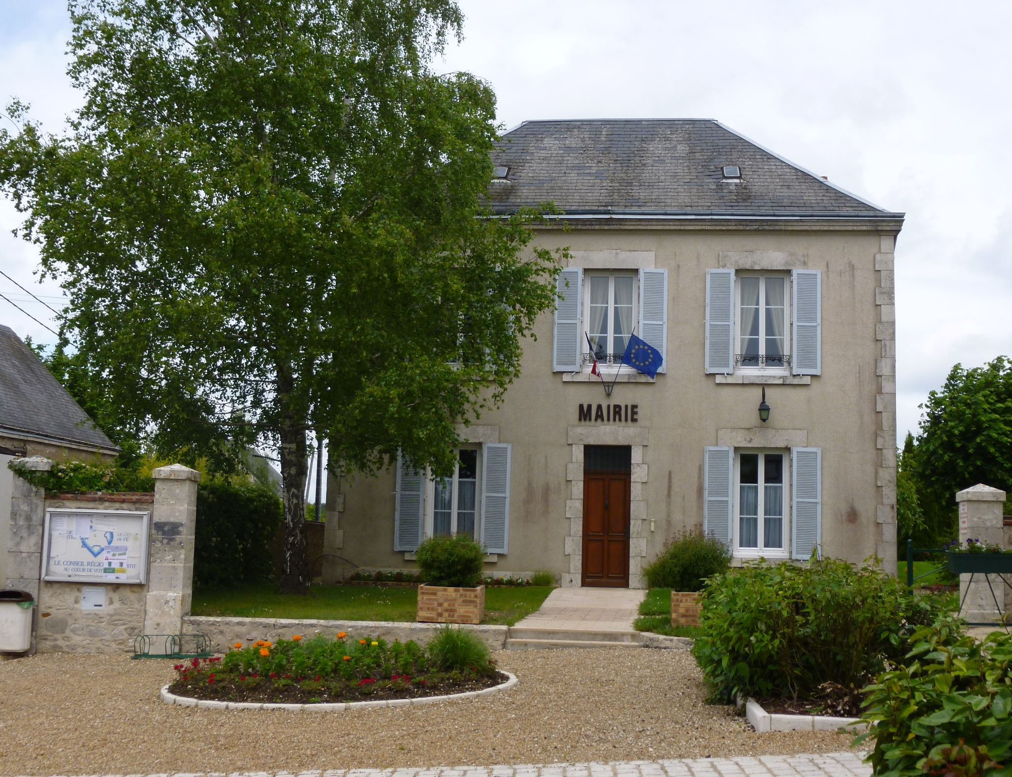 La mairie